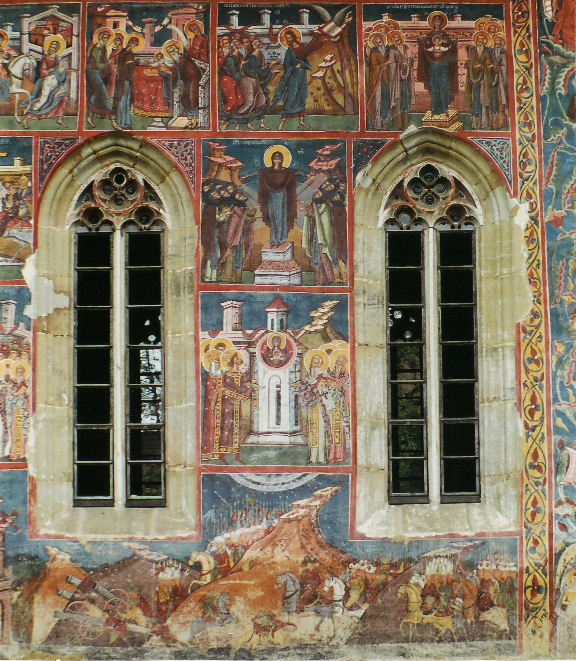 Voronet,Euseres Waldbild (Fresco)